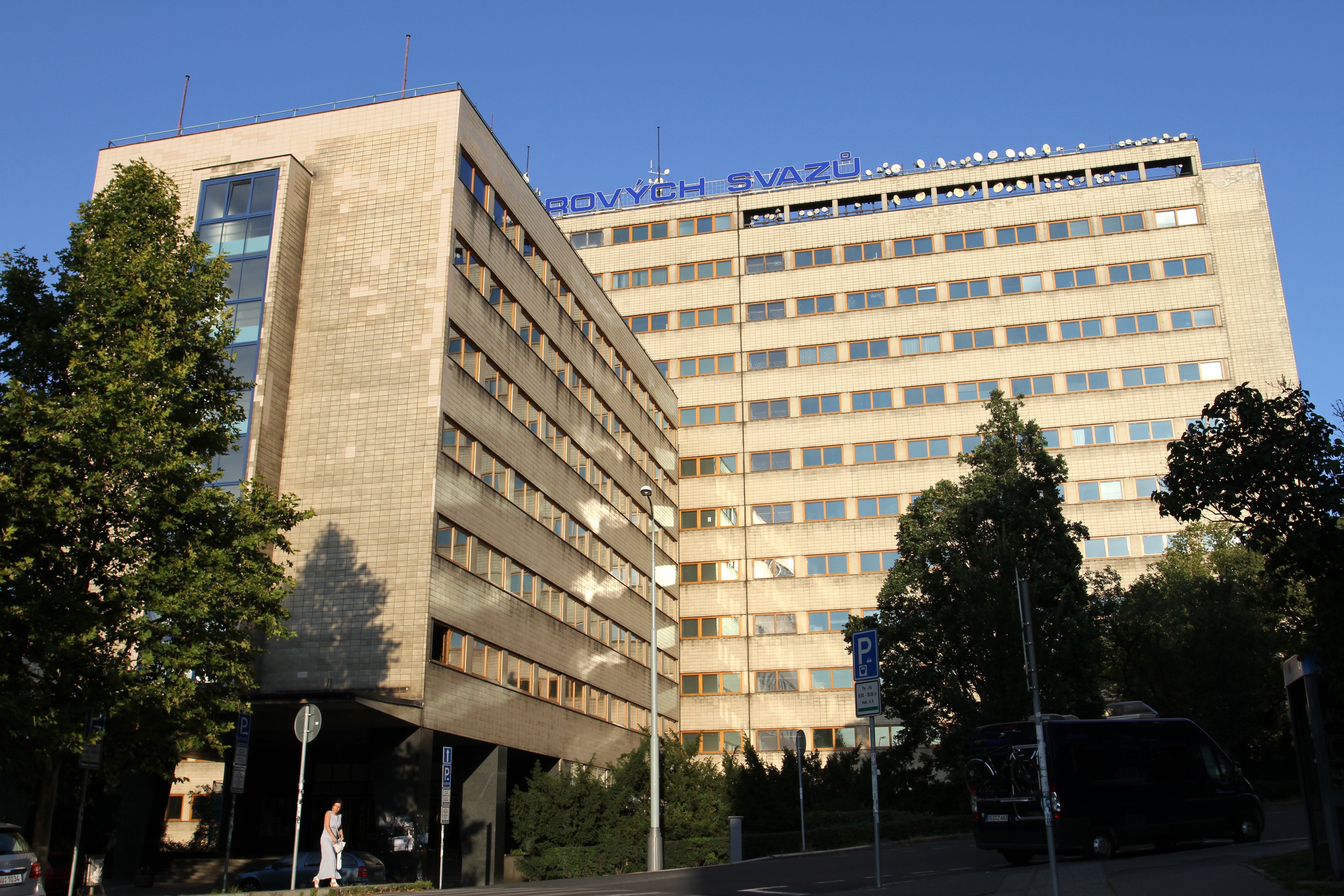 Pojišťovna - Všeobecný penzijní ústav (Žižkov), Praha 3, nám. Winstona Churchilla 1800/2, Žižkov